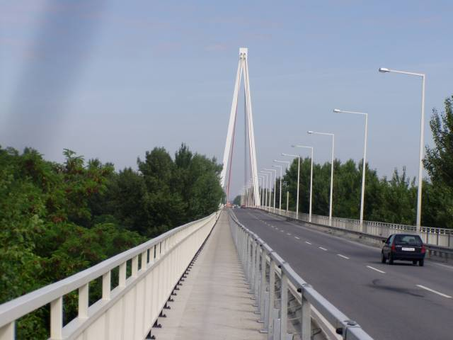 Hainburg bridge